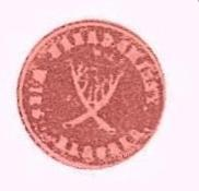 pieczęć wsi Brzuska 1876-1918